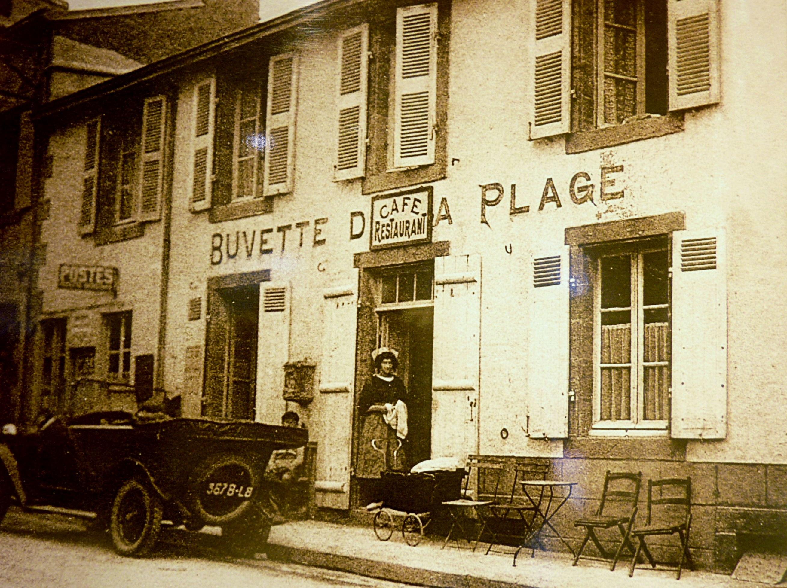 La "Buvette de la Plage" ("Maison de Marie Henry") au Pouldu vers 1900.